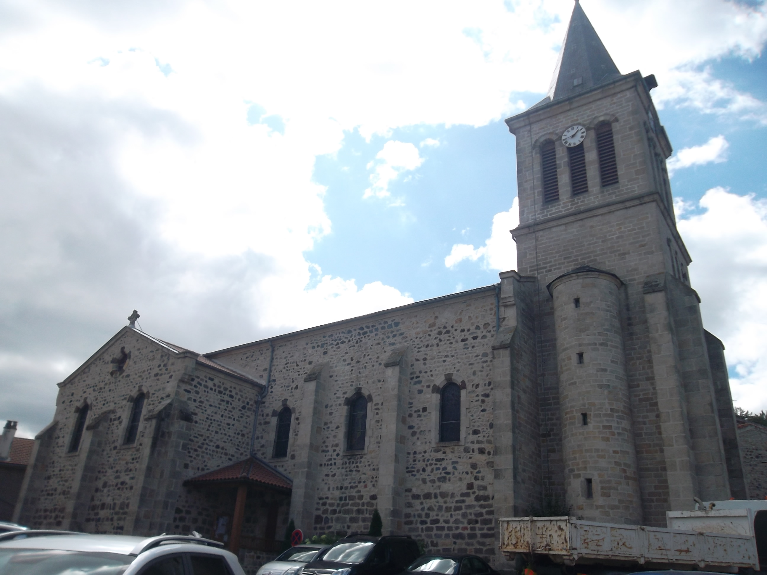 église de Lantriac